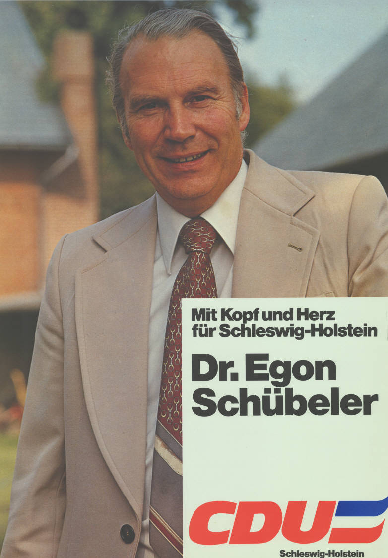 Mit Kopf und Herz für Schleswig-Holstein Dr. Egon Schübeler CDU Schleswig-Holstein Abbildung: Foto Plakatart: Kandidaten-/Personenplakat mit Porträt Auftraggeber: Verantw.: CDU Schleswig-Holstein Objekt-Signatur: 10-012 : 446 Bestand: Landtagswahlplakate Schleswig-Holstein (10-012) GliederungBestand10-18: Landtagswahlplakate Schleswig-Holstein (10-012) » Landtagswahl am 29.4.1979 » Kandidatenplakate Lizenz: KAS/ACDP 10-012 : 446 CC-BY-SA 3.0 DE